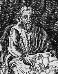 Heron von Alexandria abgebildet in der 1688 erschienen deutschen Ausgabe seiner Pneumatik